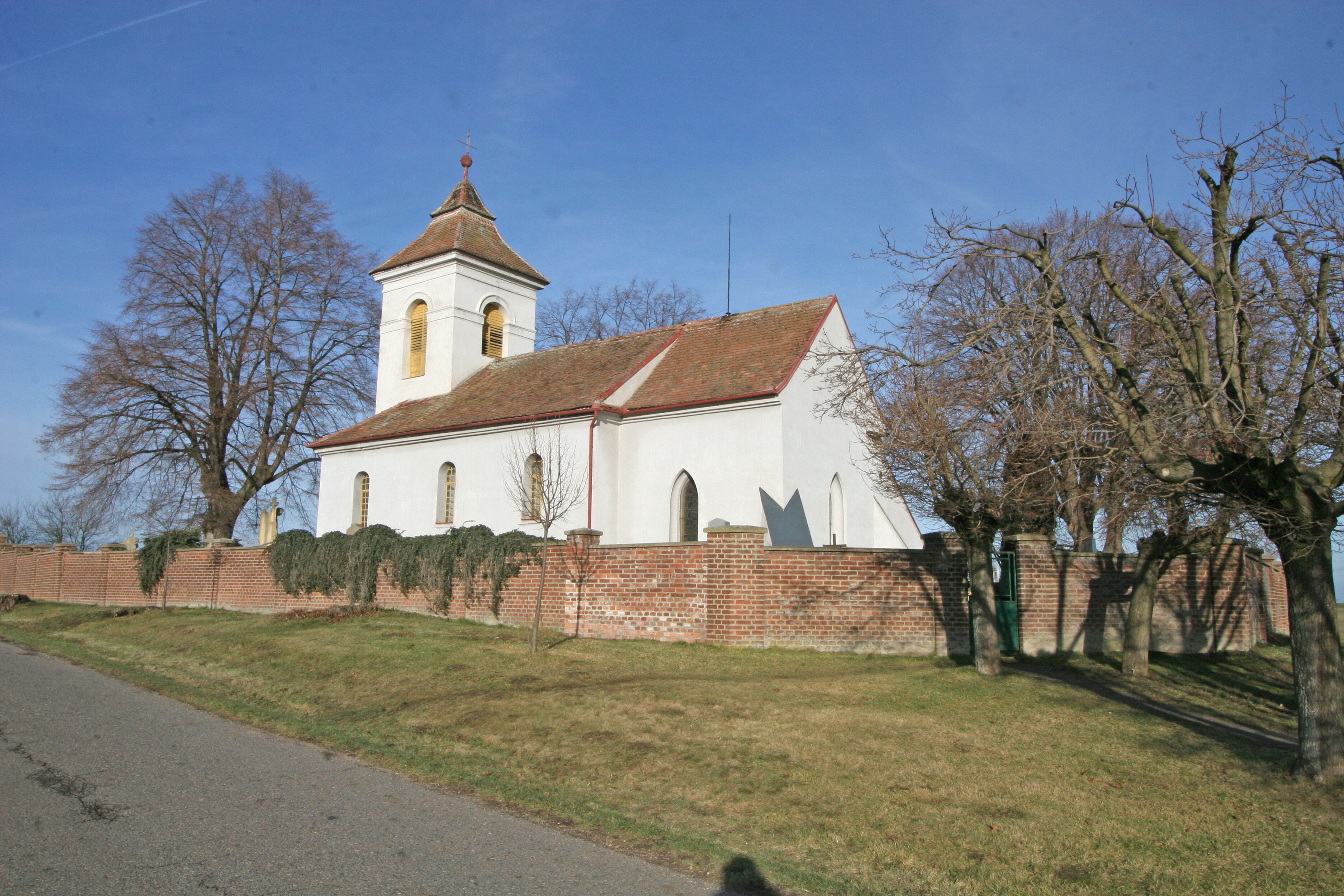 Kostel sv. Václava (Řestoky), Řestoky